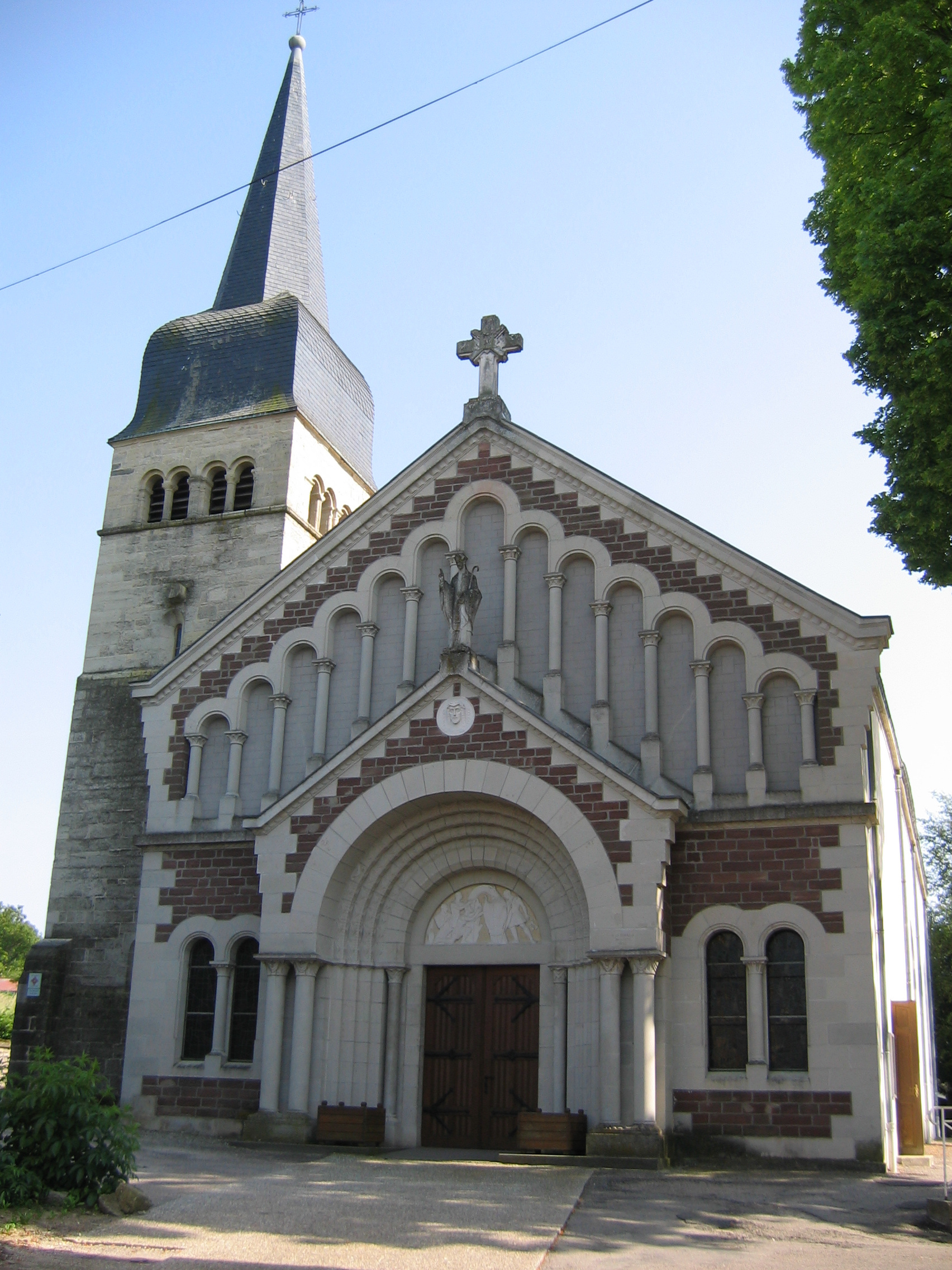 Eglise Saint-Epvre, église romane du XIIè siècle, à Contrexéville, Vosges, Lorraine, France